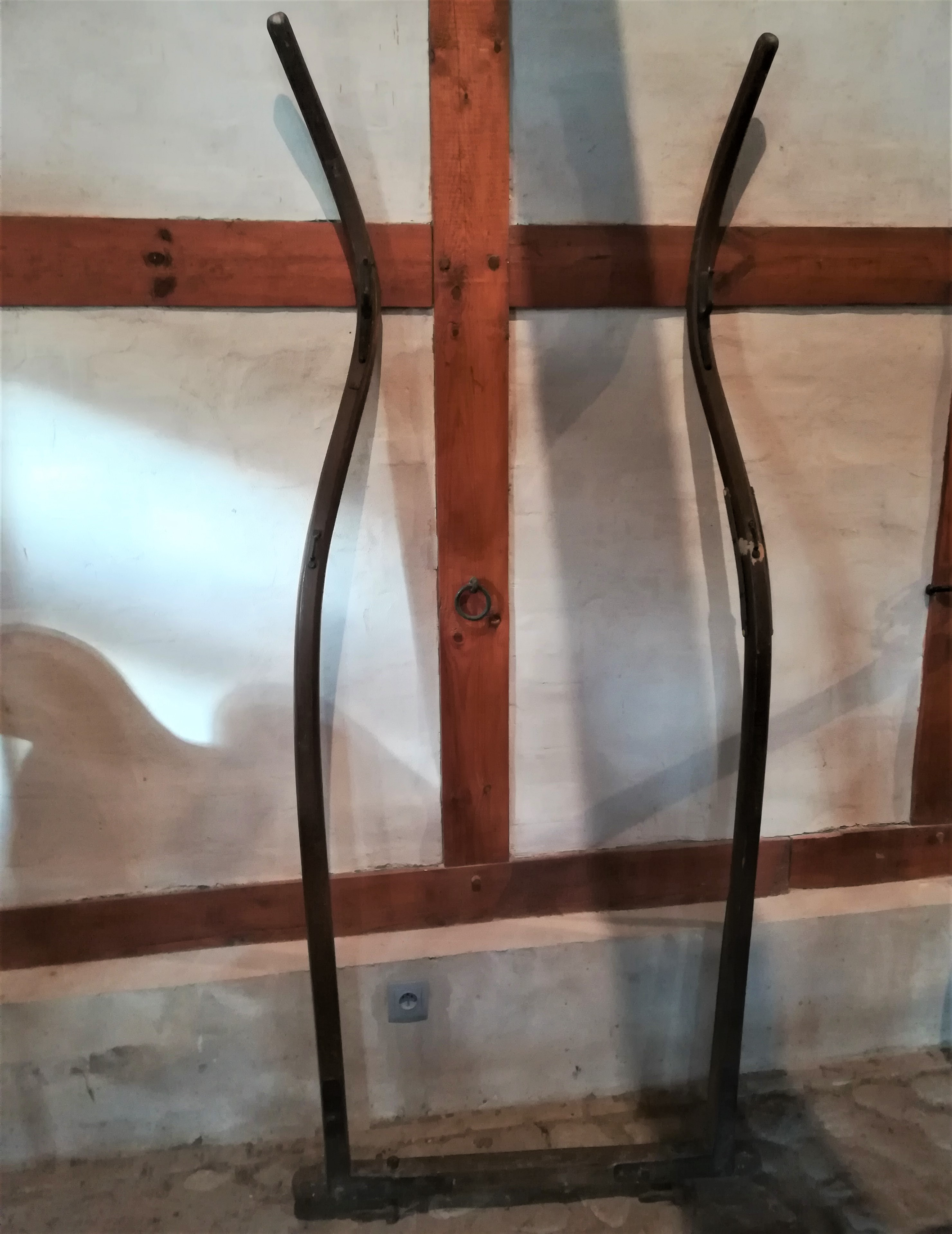 Hołoble - fragment uprzęży podlaskiej. Ekspozycja w Forcie Boyen w Gizycku.